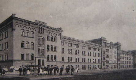 Grossherzoglich-Hessische Eisgrub Kaserne in Mainz; 1. Nassauisches Infanterie-Regiment Nr. 87. Der Friedensvertrag von Versailles forderte die Niederlegung der erst 1839 als Defensionskaserne errichteten Kaserne